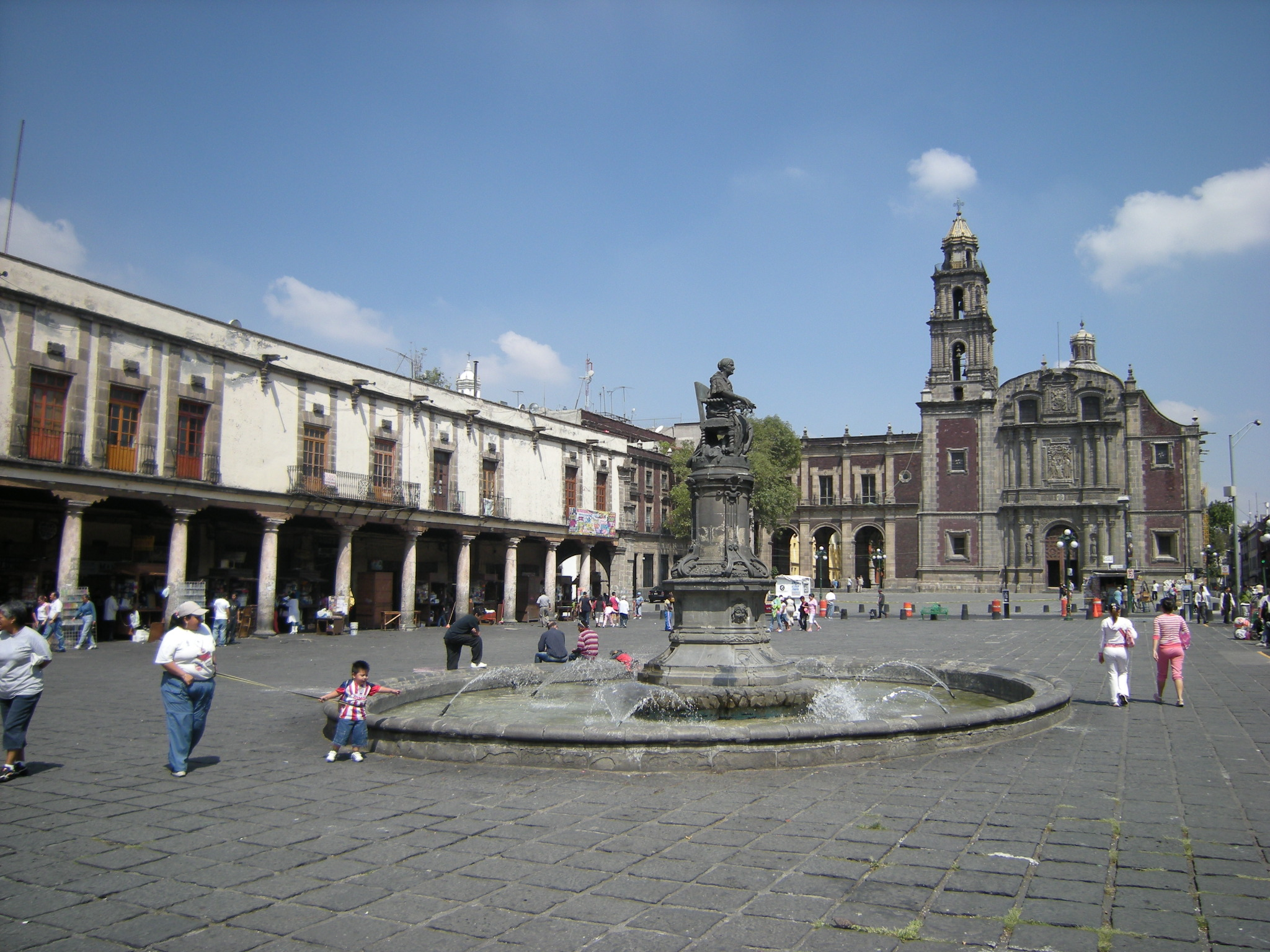 Cidade do México